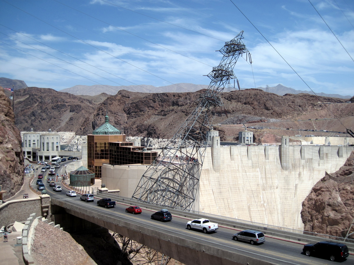 Hoover Dam